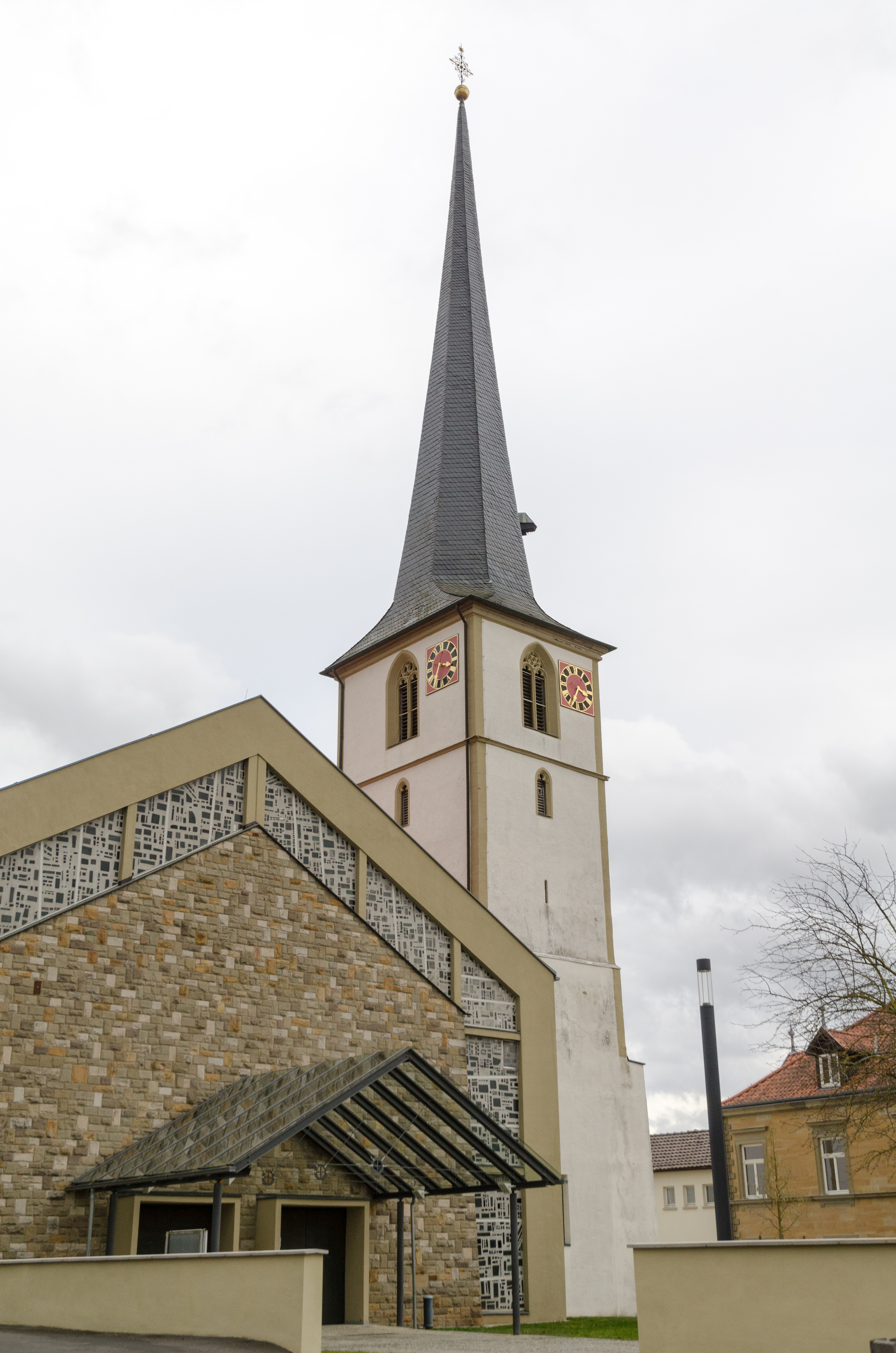 Wülfershausen an der Saale, Katholische Pfarrkirche St. Veit